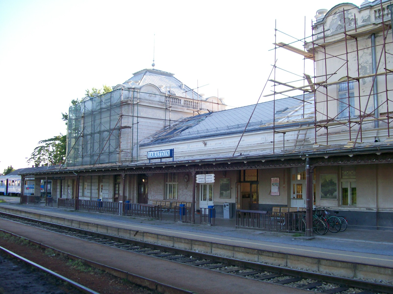 Željeznički kolodvor Varaždin